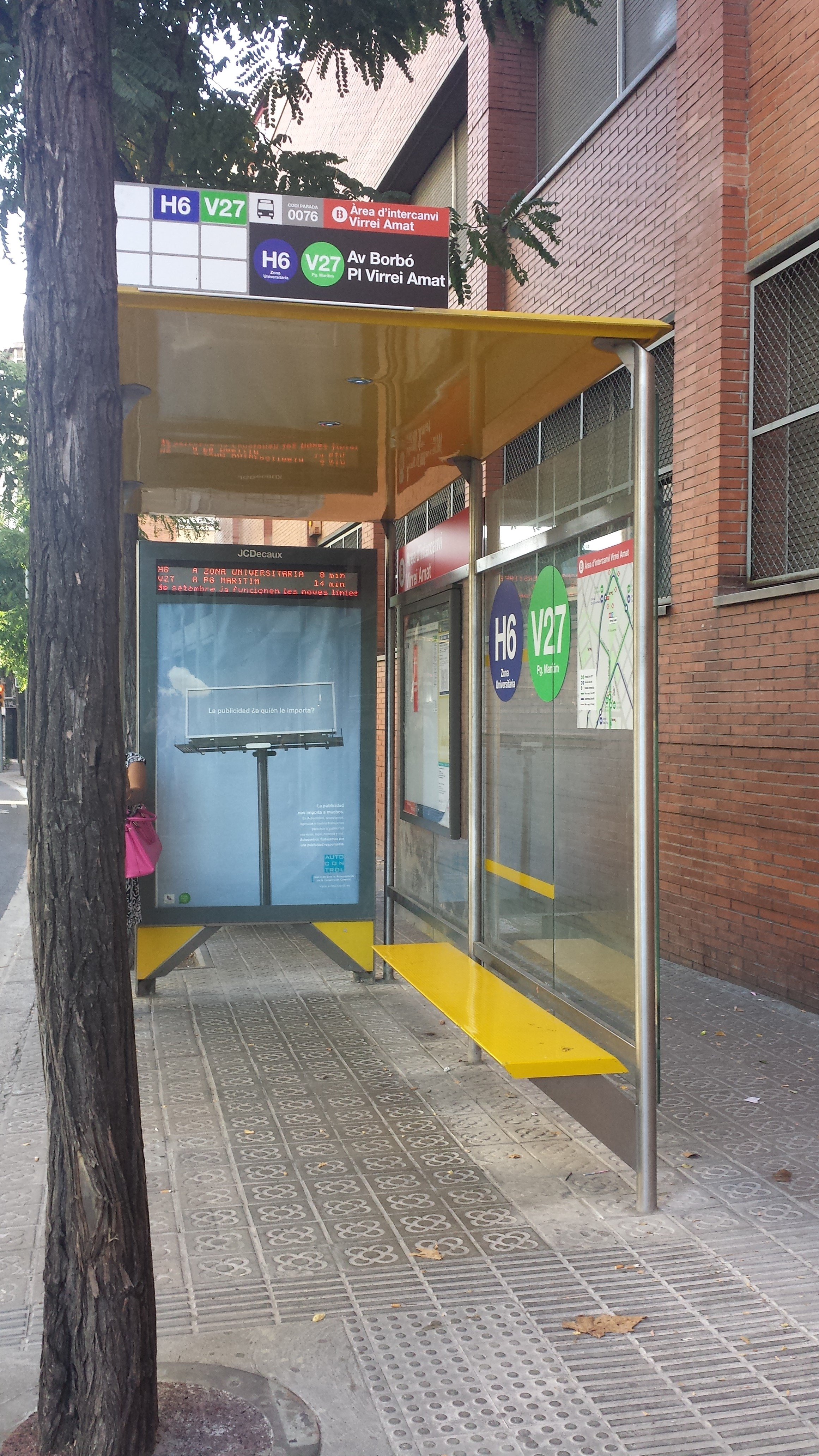 Àrea d'intercanvi de Virrei Amat línies H6 i V27